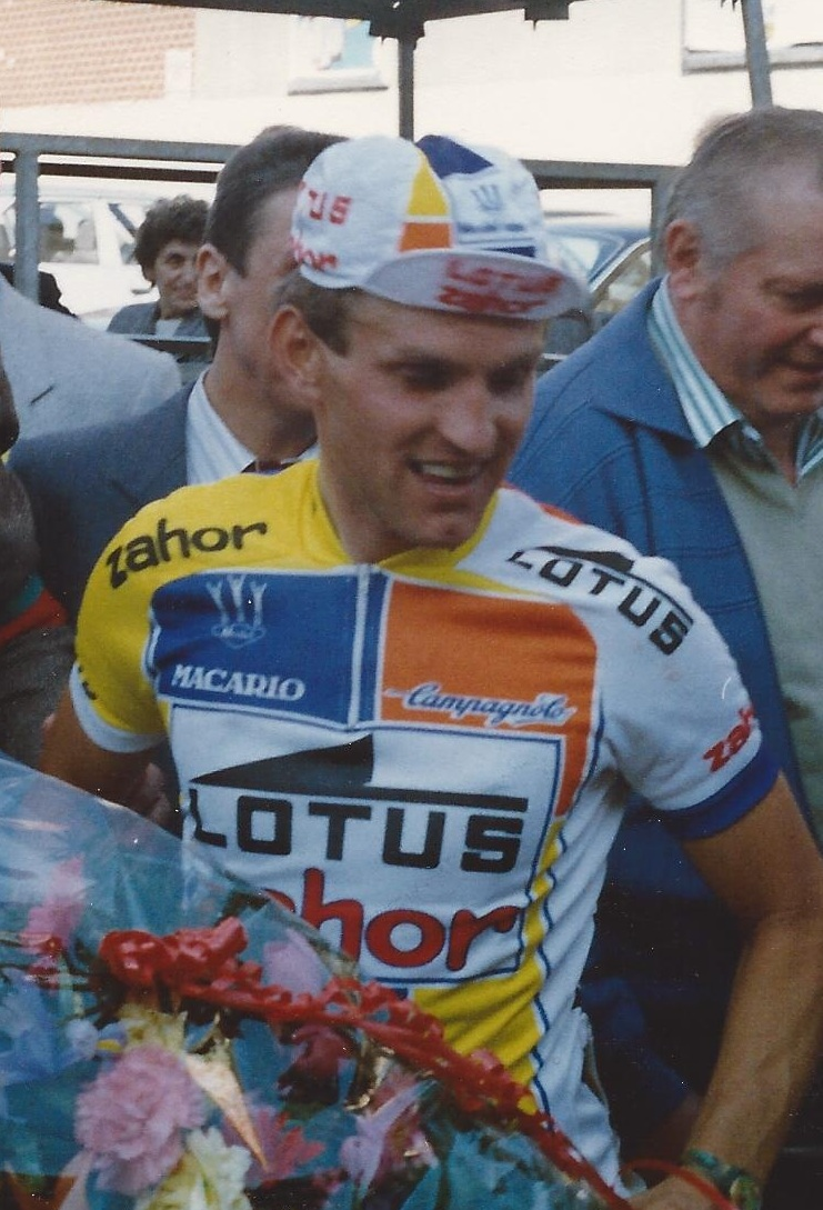 BENNY VAN BRABANT vainqueur course cycliste pro. a hannut en 1989